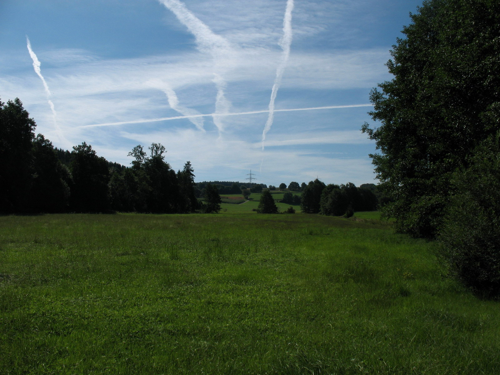 Das Saubachtal zwischen Laupertshausen und Äpfingen. (Der Saubach fließt rechts und der Blick ist nach Norden gerichtet.)